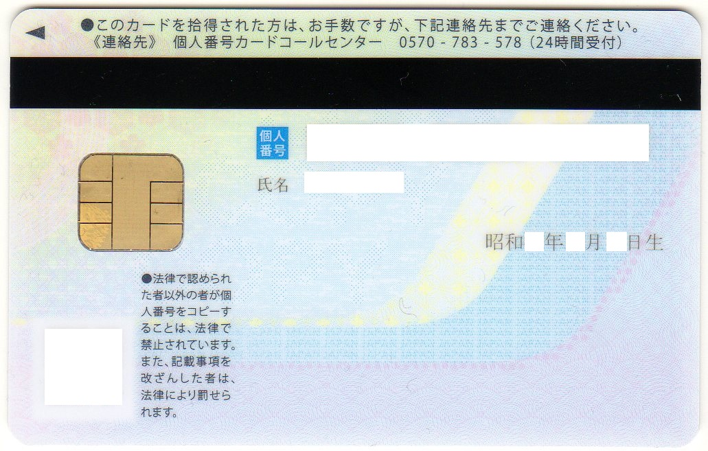 投稿者のものをスキャンし個人情報を抹消。